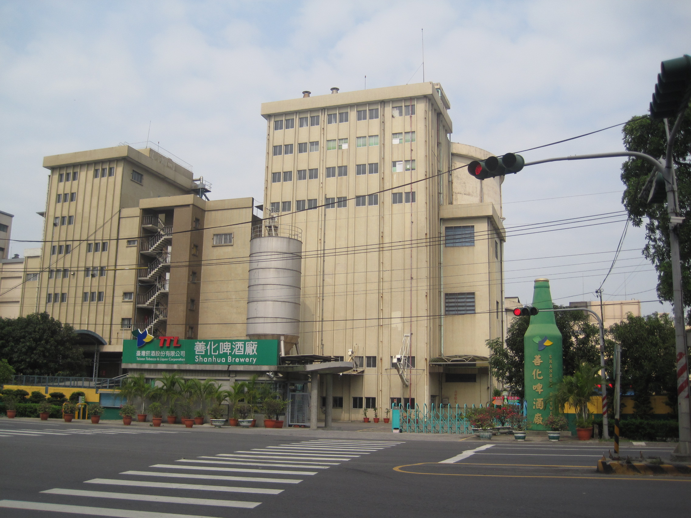 中文（台灣）: 臺灣菸酒公司善化啤酒廠。